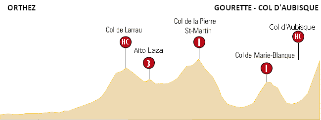 Profile of stage 16 of the 2007 Tour de France - 16e etappe v/d Ronde van Frankrijk 2007